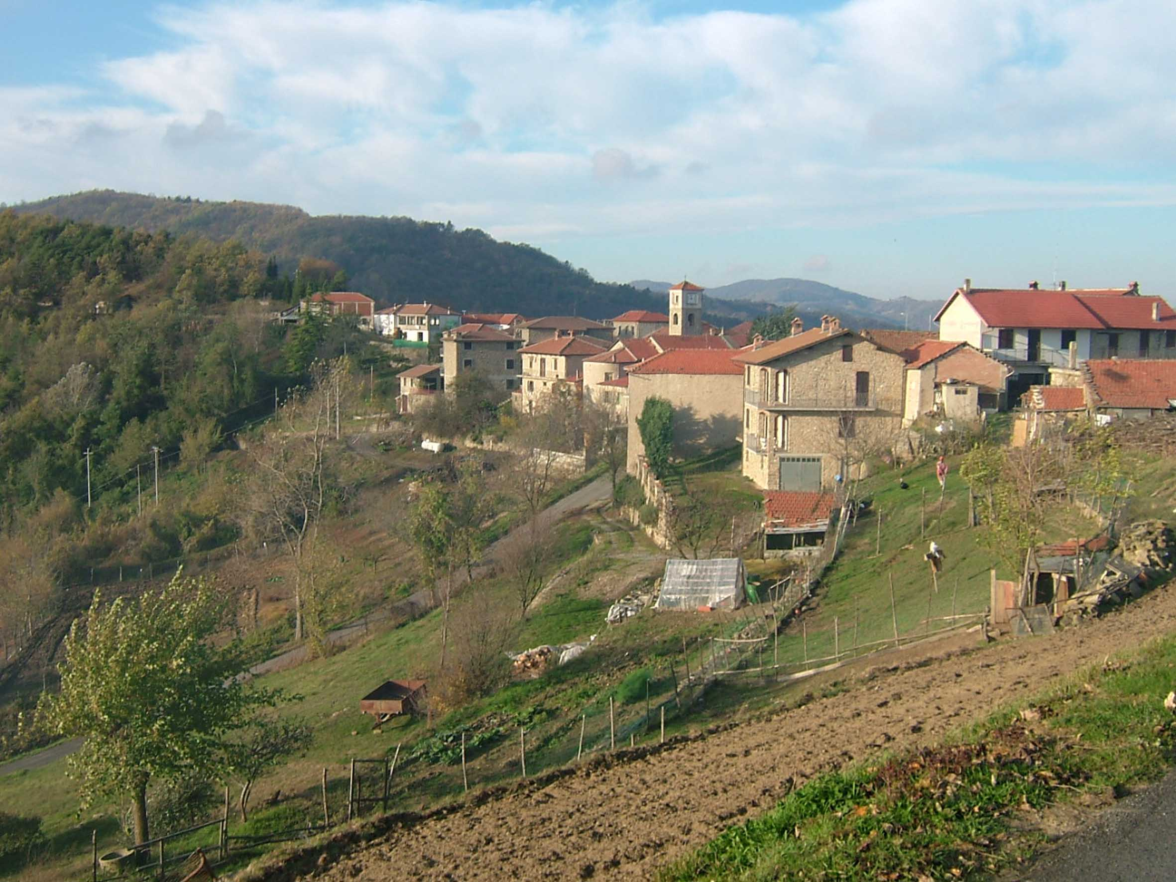 Bergolo CN